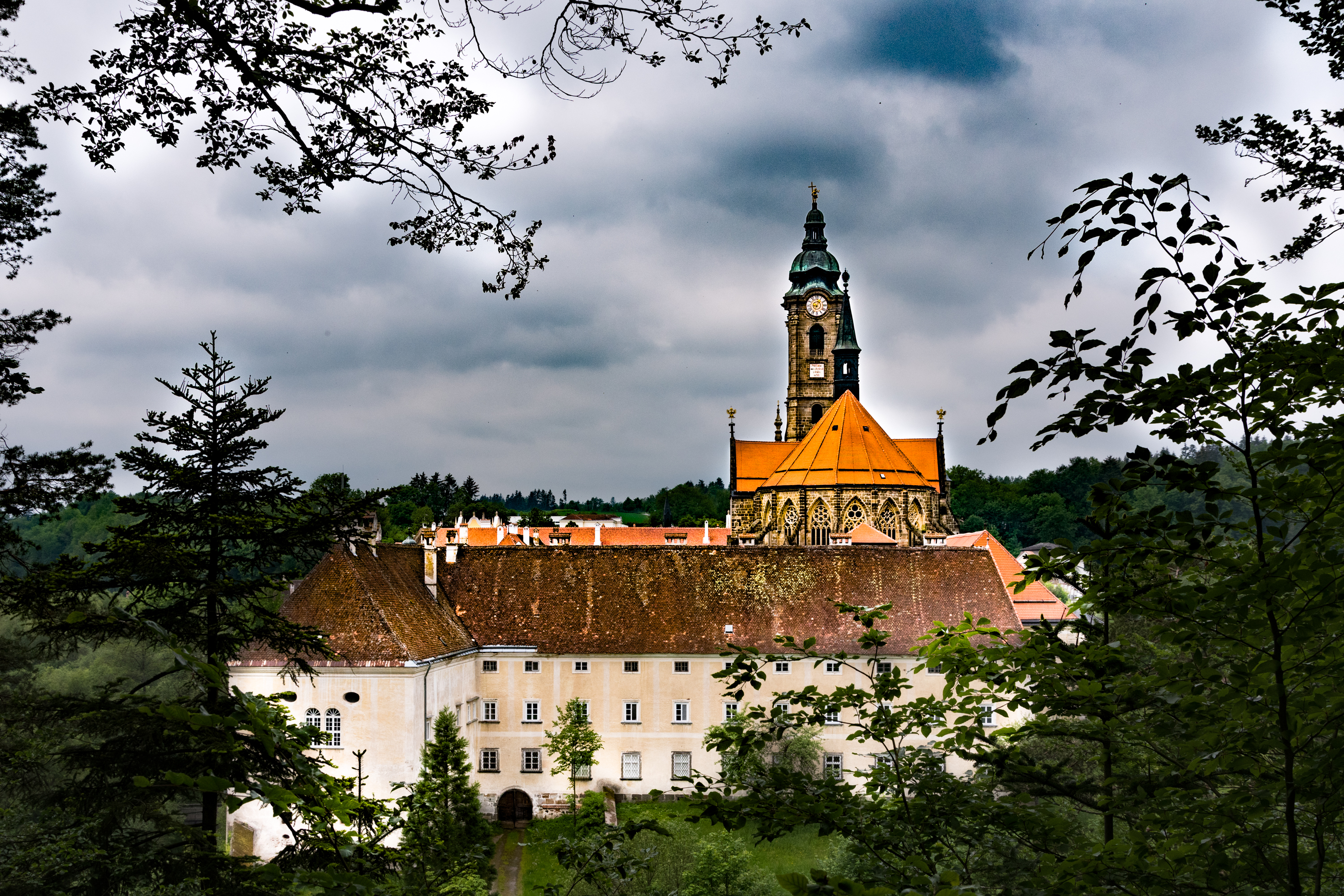 Zwettl - Oratorium der Stiftskirche Zwettl Dieses Bild wurde anlässlich des österreichischen Tags des Denkmals 2016 in Niederösterreich eingereicht.